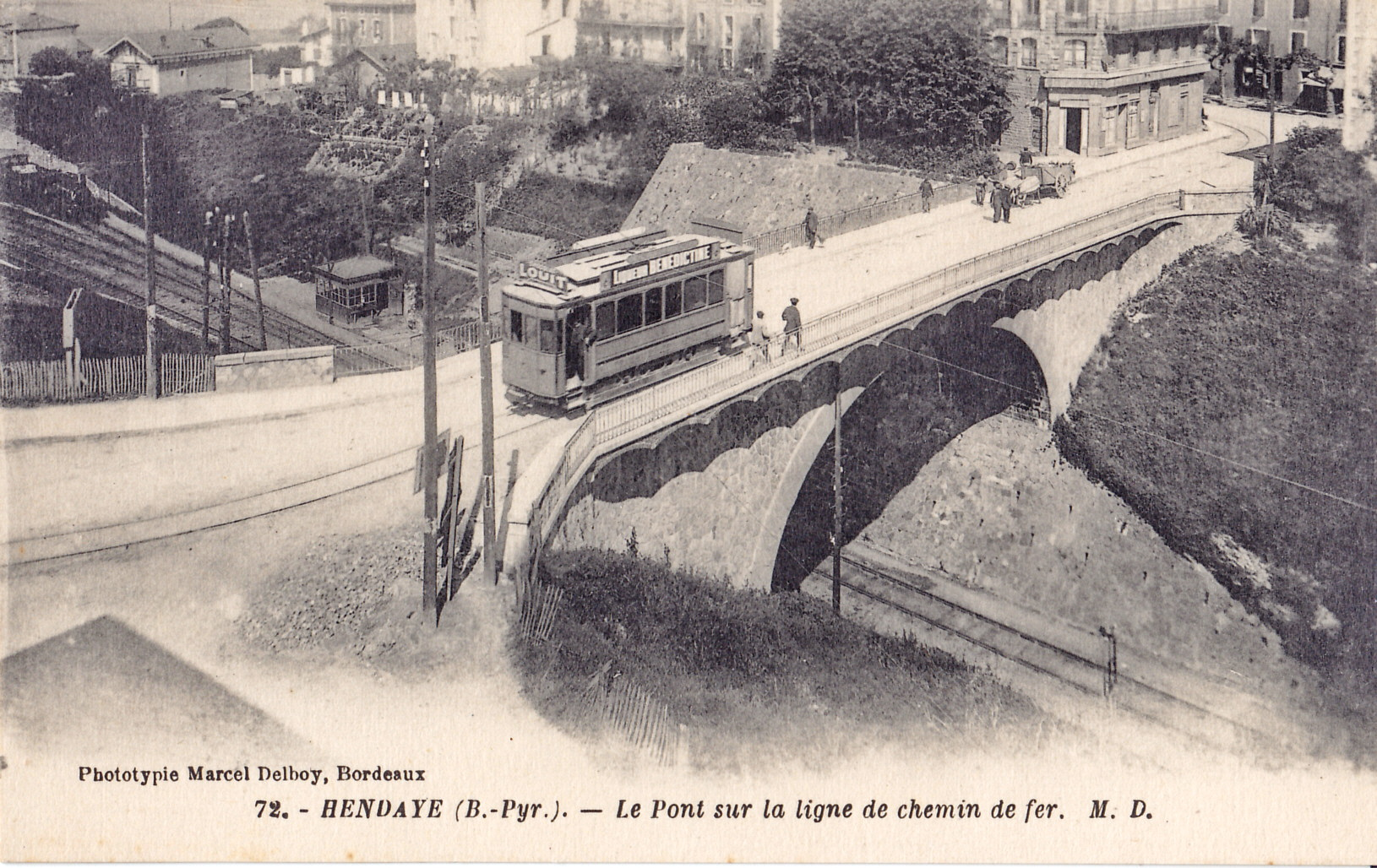 Carte postale ancienne éditée par Marcel Delboy (MD), phototypie à Bordeaux, n°72 : HENDAYE - Le Pont sur la ligne de chemin de fer